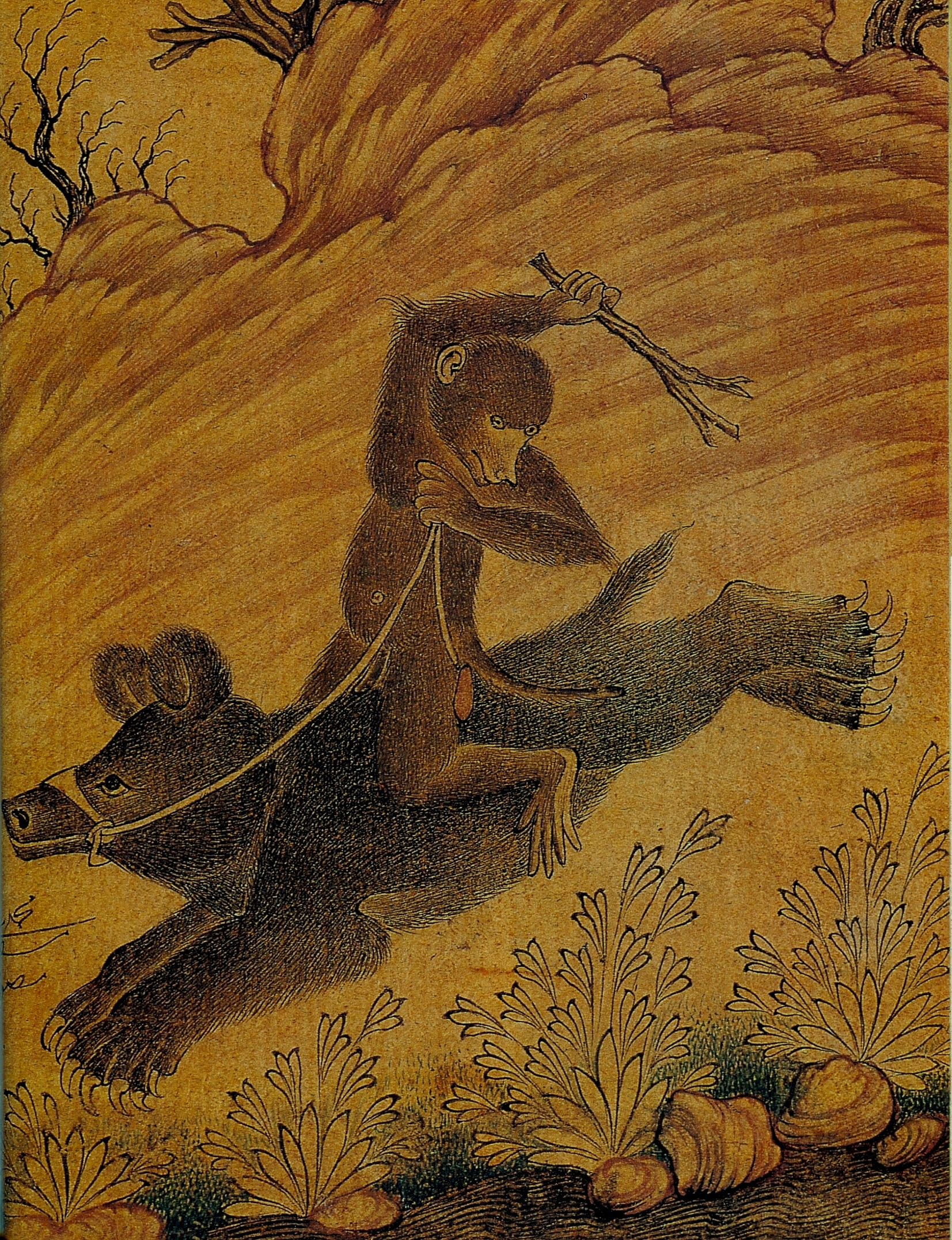 Обезьяна на медведе.деталь.Сер. 17в. Эрмитаж